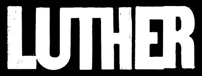 Diese Grafik zeigt das Logo der TV Serie Luther